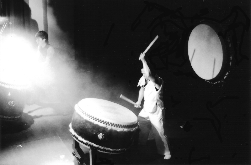 Concierto de Taiko en centro Conde Duque, Madrid